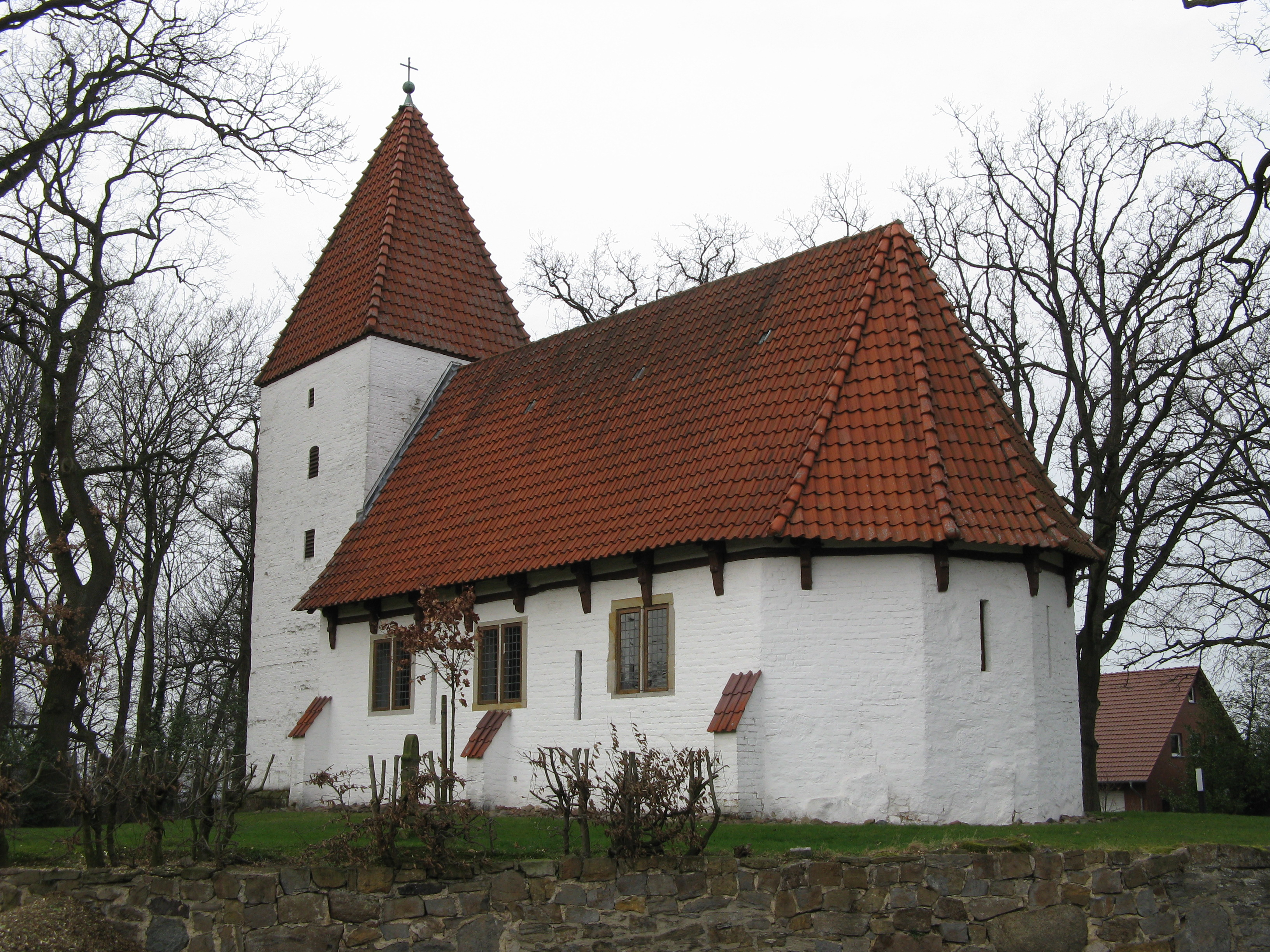 Kapelle Nordhemmern This image shows a heritage building in Germany, located in the North Rhine-Westphalian city Hille (no. 23).